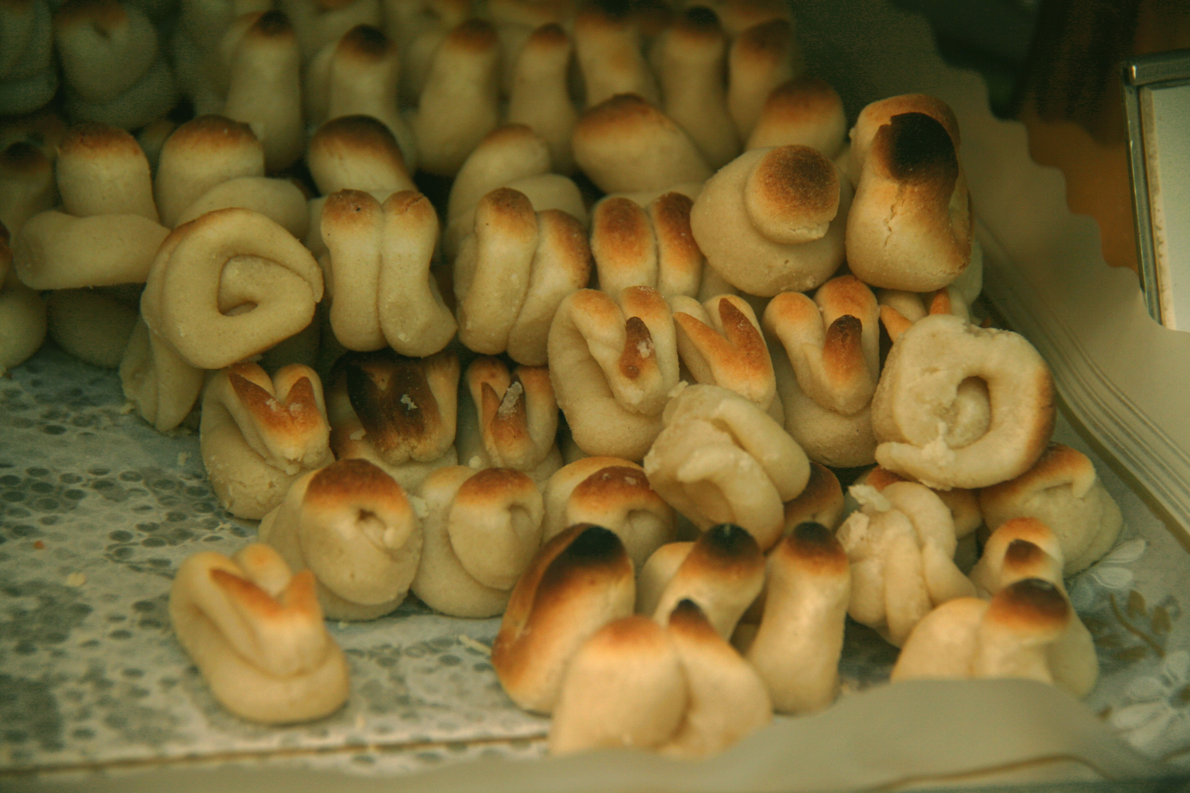 Mazapán navideño - Casa Mira